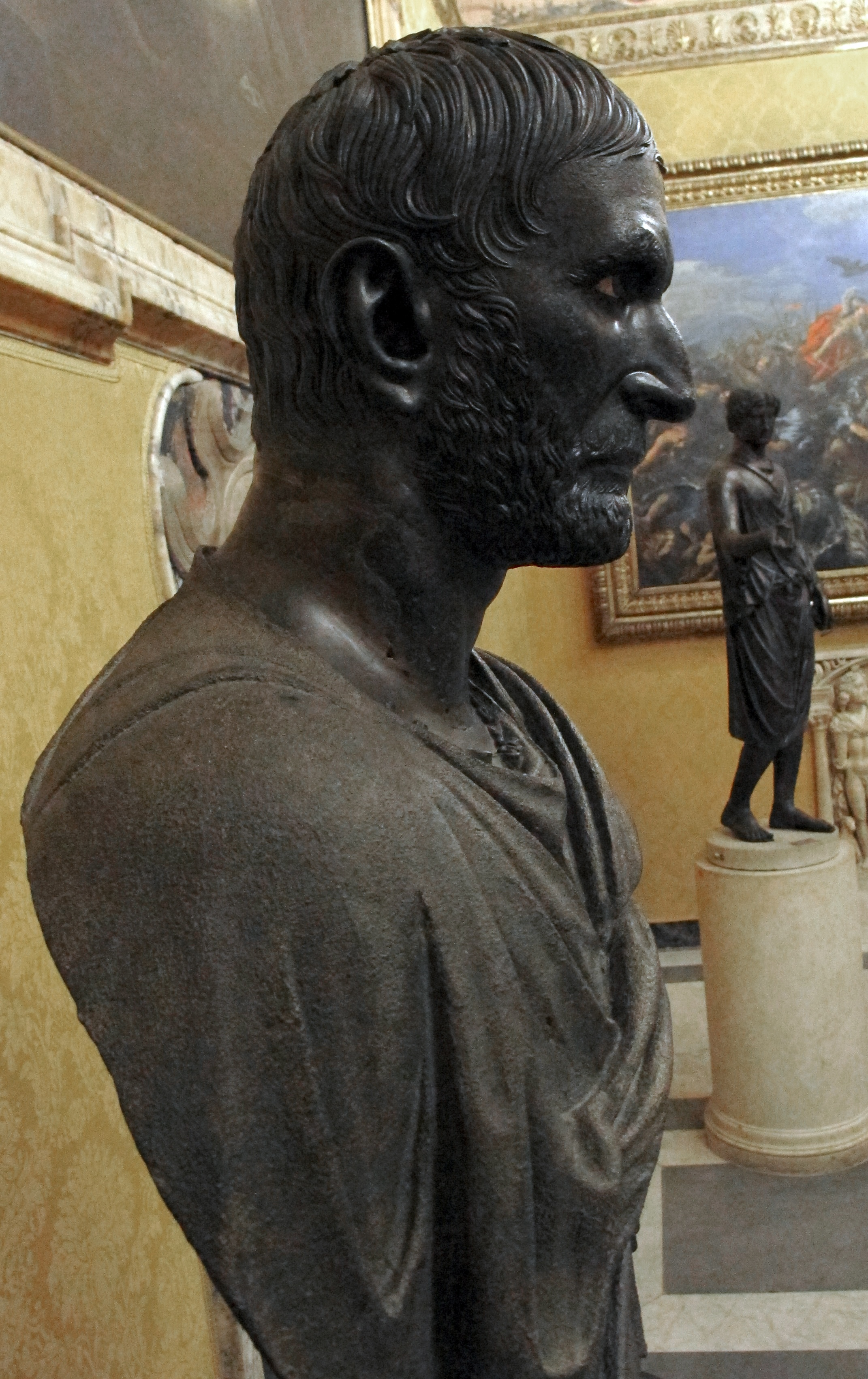 Statue antiche, musei Capitolini, Roma